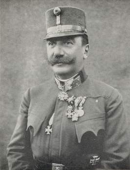 Peter von Hofmann osztrák-magyar gyalogsági tábornok